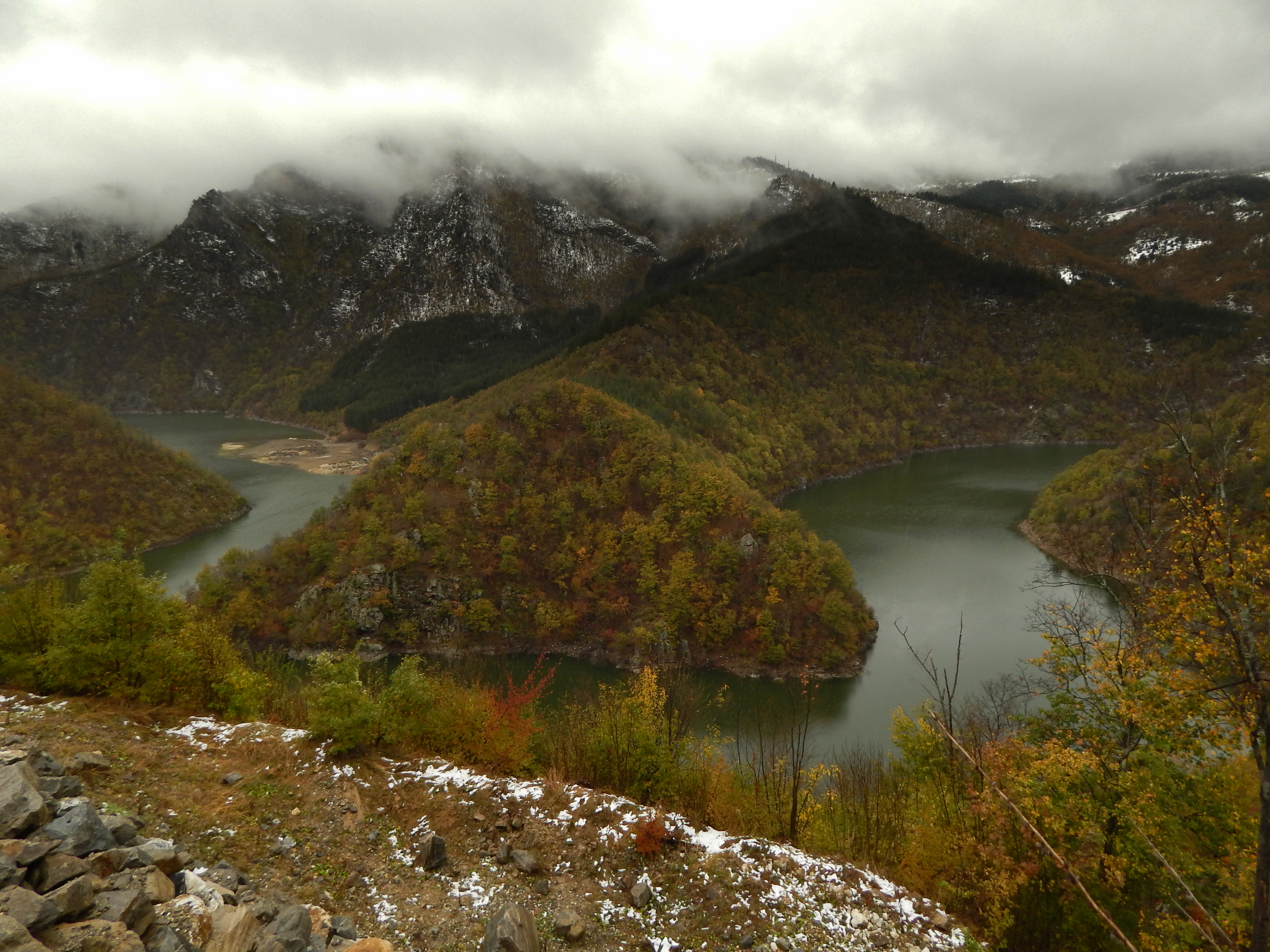 Резерват Кастракли, меандри по река Въча